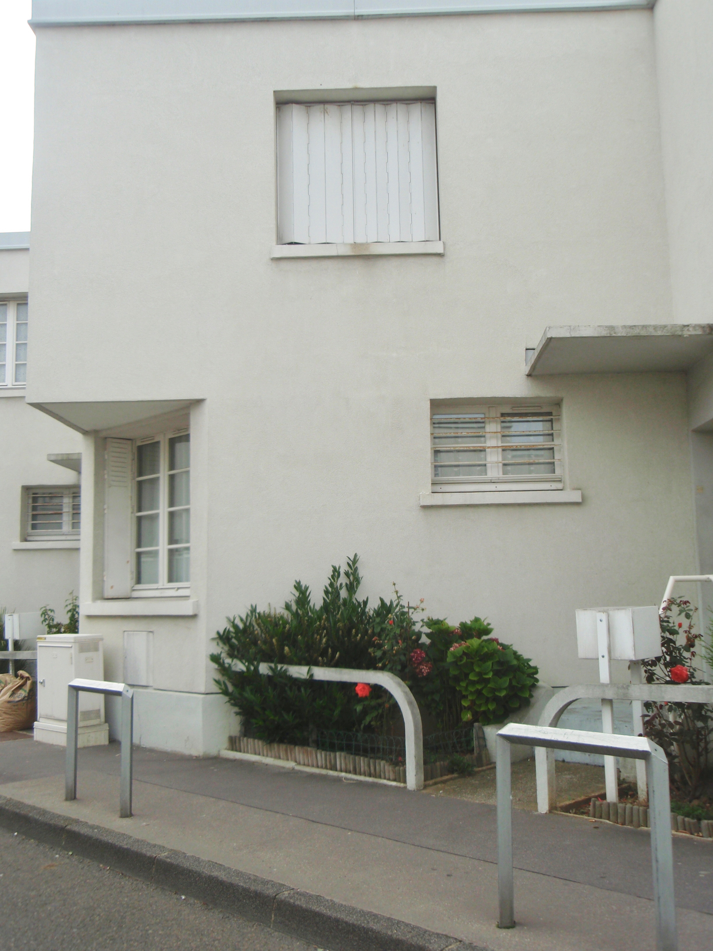 Lotissement des Dents de scie à Trappes en Yvelines